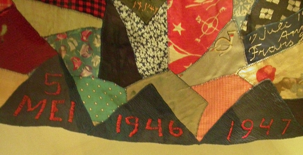 Deel Nationale Feestrok